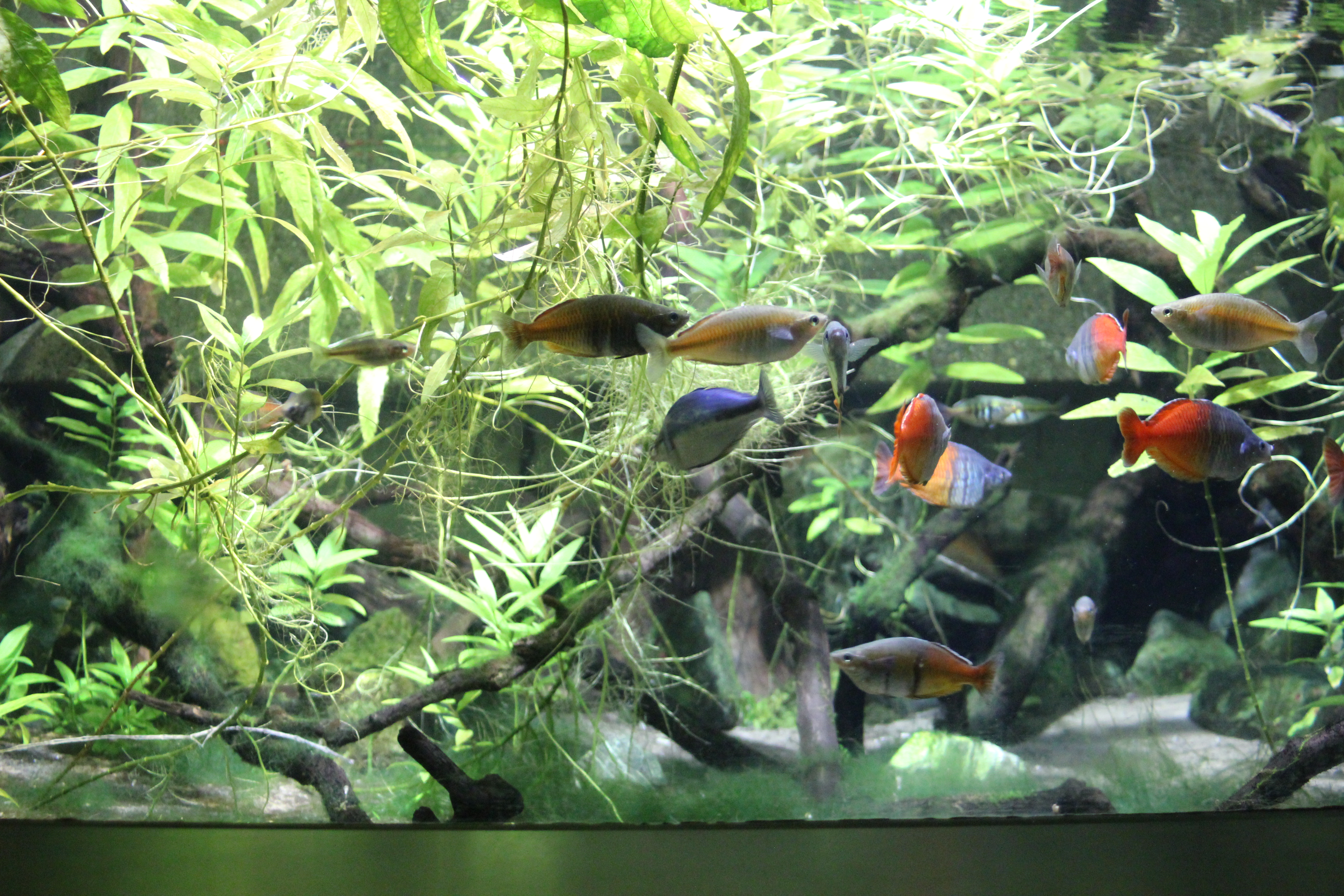 Aquarium at Amsterdam Zoo / Artis